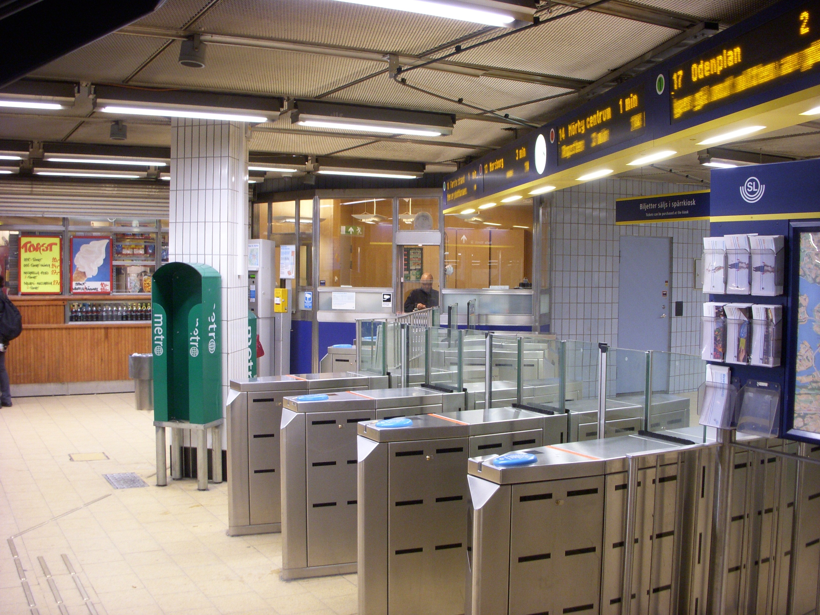 Slussen, Stockholm, inventering april 2009, T-banan